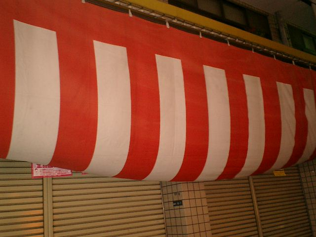 紅白幕（2005年10月 MASAが東大阪市・徳庵にある服飾店・マームの店頭前で撮影）